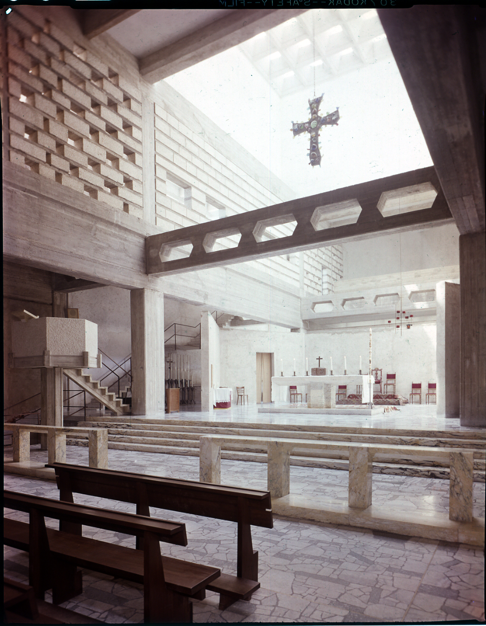 Servizio fotografico : Milano, 1960 / Paolo Monti. - Buste: 5, Fototipi: 5 : Diapositiva, sviluppo cromogeno/ pellicola ; 10x12. - ((Serie costituita da 5 diapositive identificate con i nn.: 483-487. La suddetta serie è contenuta nella scatola identificata con la numerazione G471/620. All'interno del pergamino foglio manoscritto: "Milano/ Chiesa dei poberi/ arch. Figini/ e Pollini".